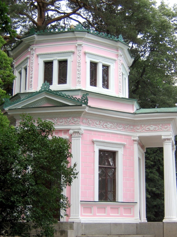 Розовый павильон.